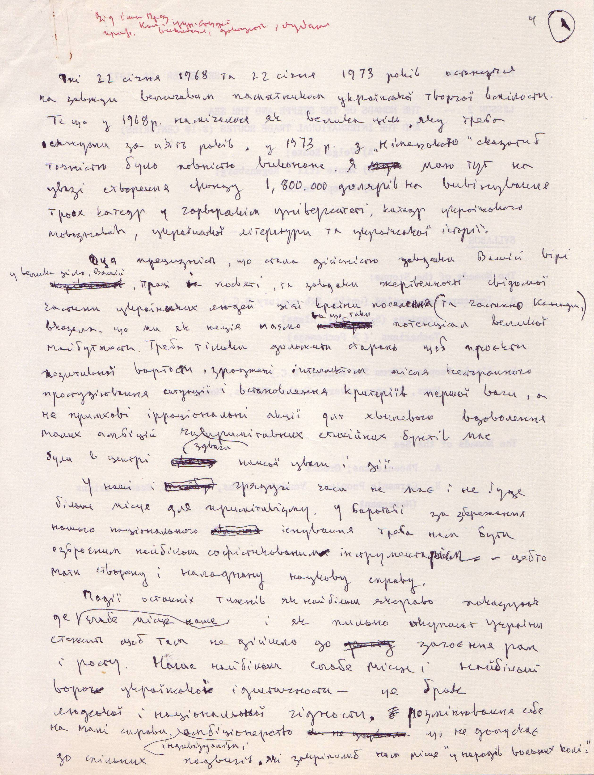 Рукопис Омеляна Пріцака, чернетка тексту виступу О.Пріцака, присвячених створенню та діяльності Українського наукового інституту